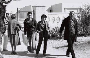 Le Pr Aouchiche et son équipe lors d'une campagne anti-trachomateuse au Sahara